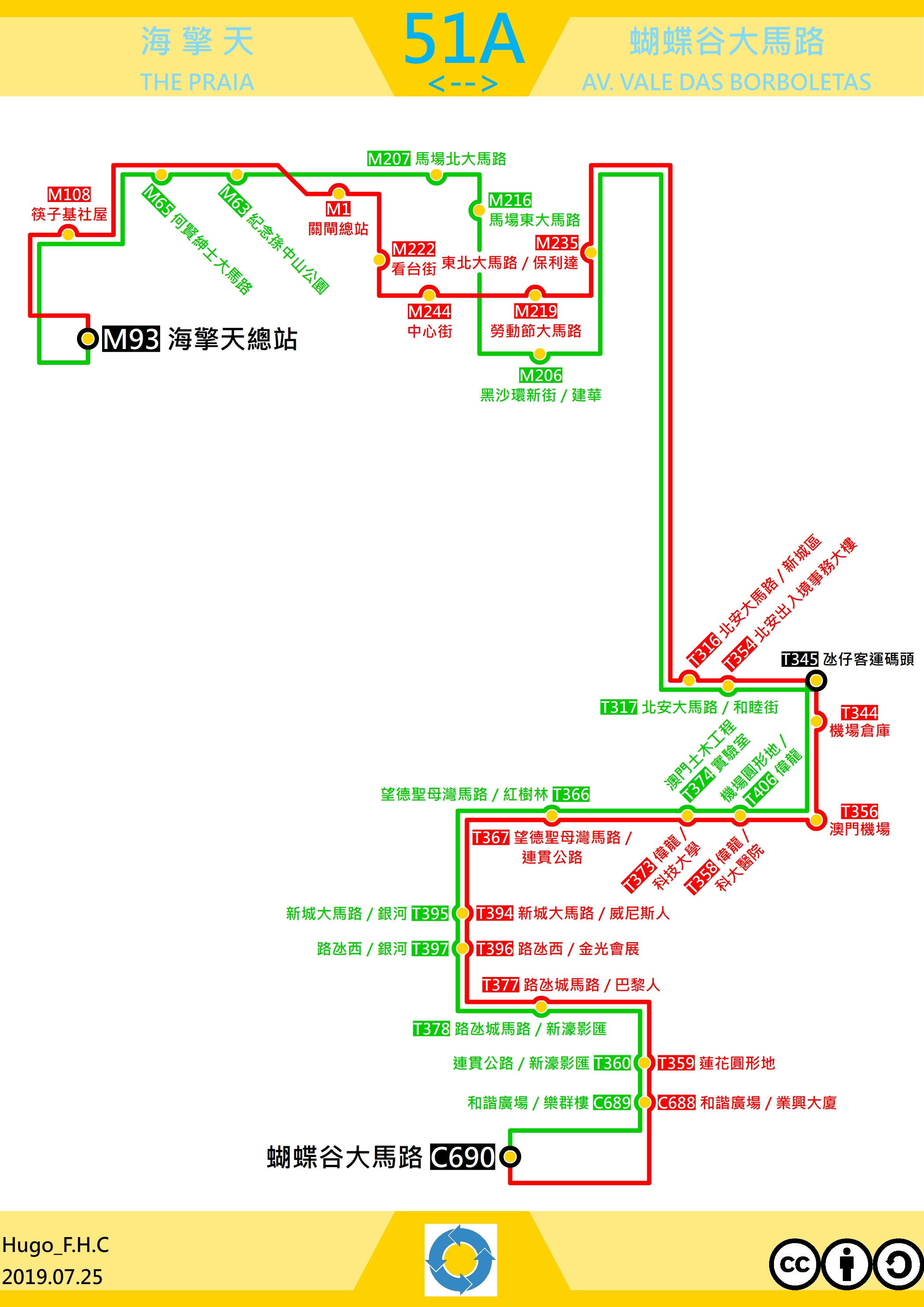 澳門巴士51A走線圖